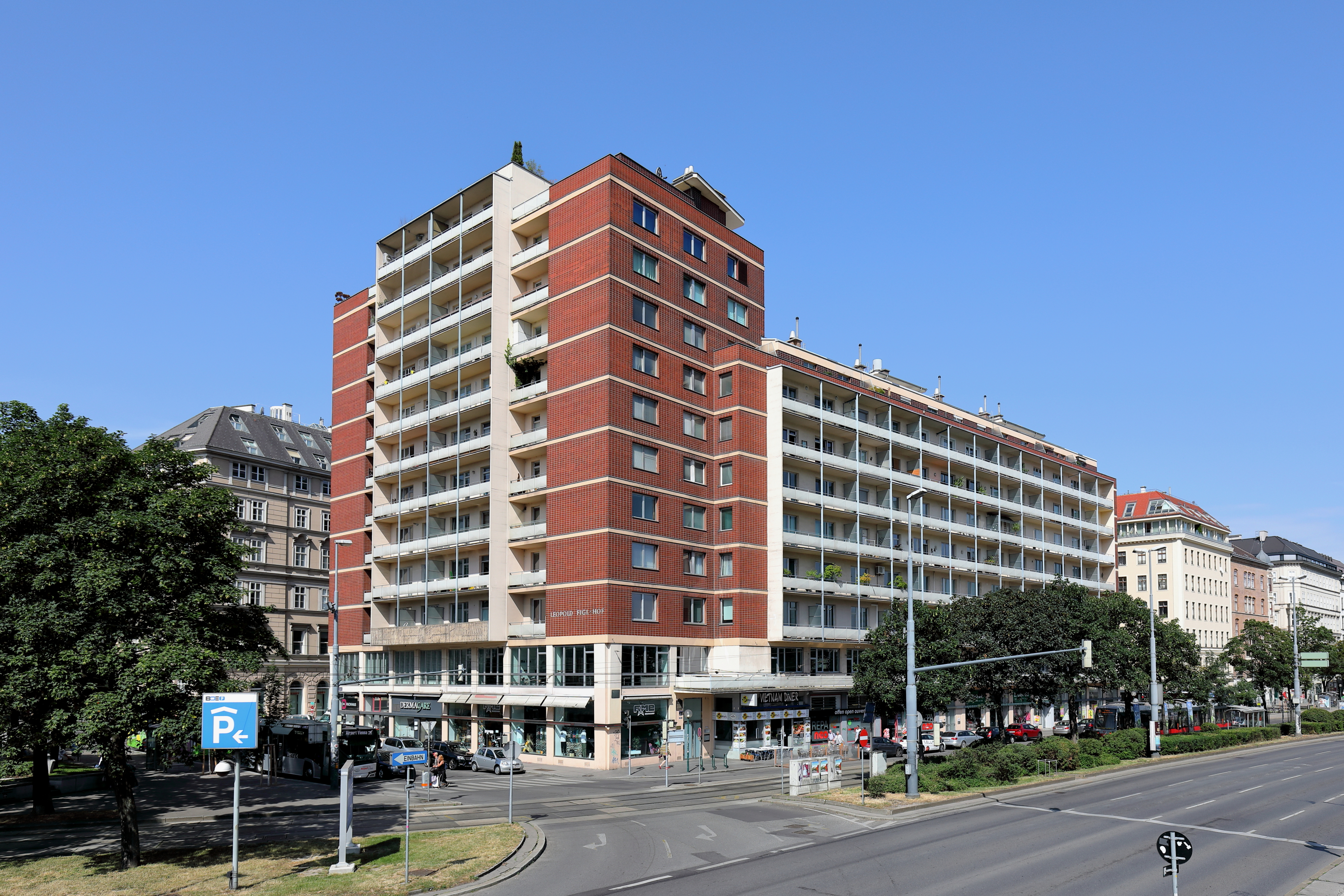 Die Ostansicht des sogenannten „Leopold-Figl-Hofes“ am Morzinplatz (Morzinplatz 4, Franz-Josefs-Kai 31-33, Gonzagagasse 2-4, Salztorgasse 6) im 1. Wiener Gemeindebezirk Innere Stadt. Die acht- bis zwölfgeschossige Wohnhausanlage in Stahlbetonskelettbauweise wurde von 1963 bis 1967 nach Plänen von Josef Vytiska errichtet und nach dem ehemaligen österr. Bundeskanzler Leopold Figl benannt.